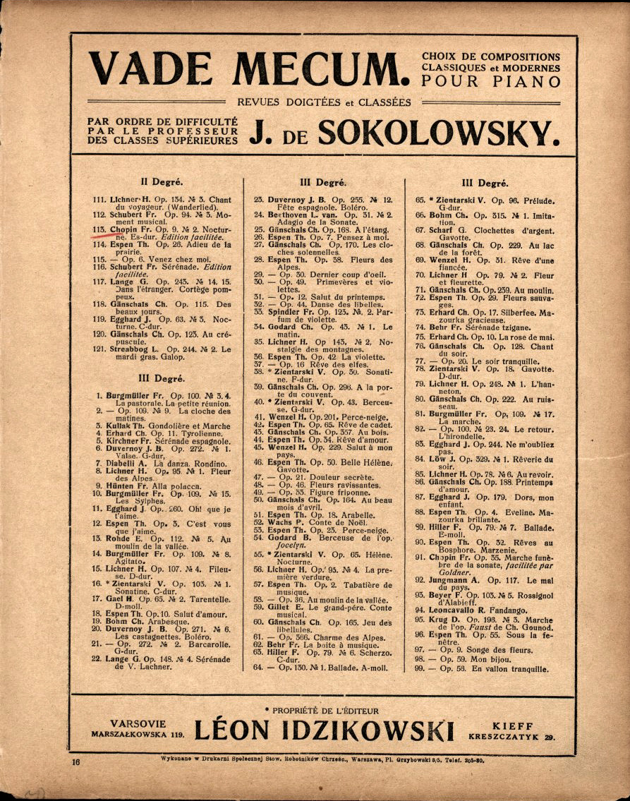 Nokturny. Op. 9. Nr 2 Nocturne op. 9 n. 2. - Ed. facilitée. - Varsovie ; Kieff L. Idzikowski, ca 1920